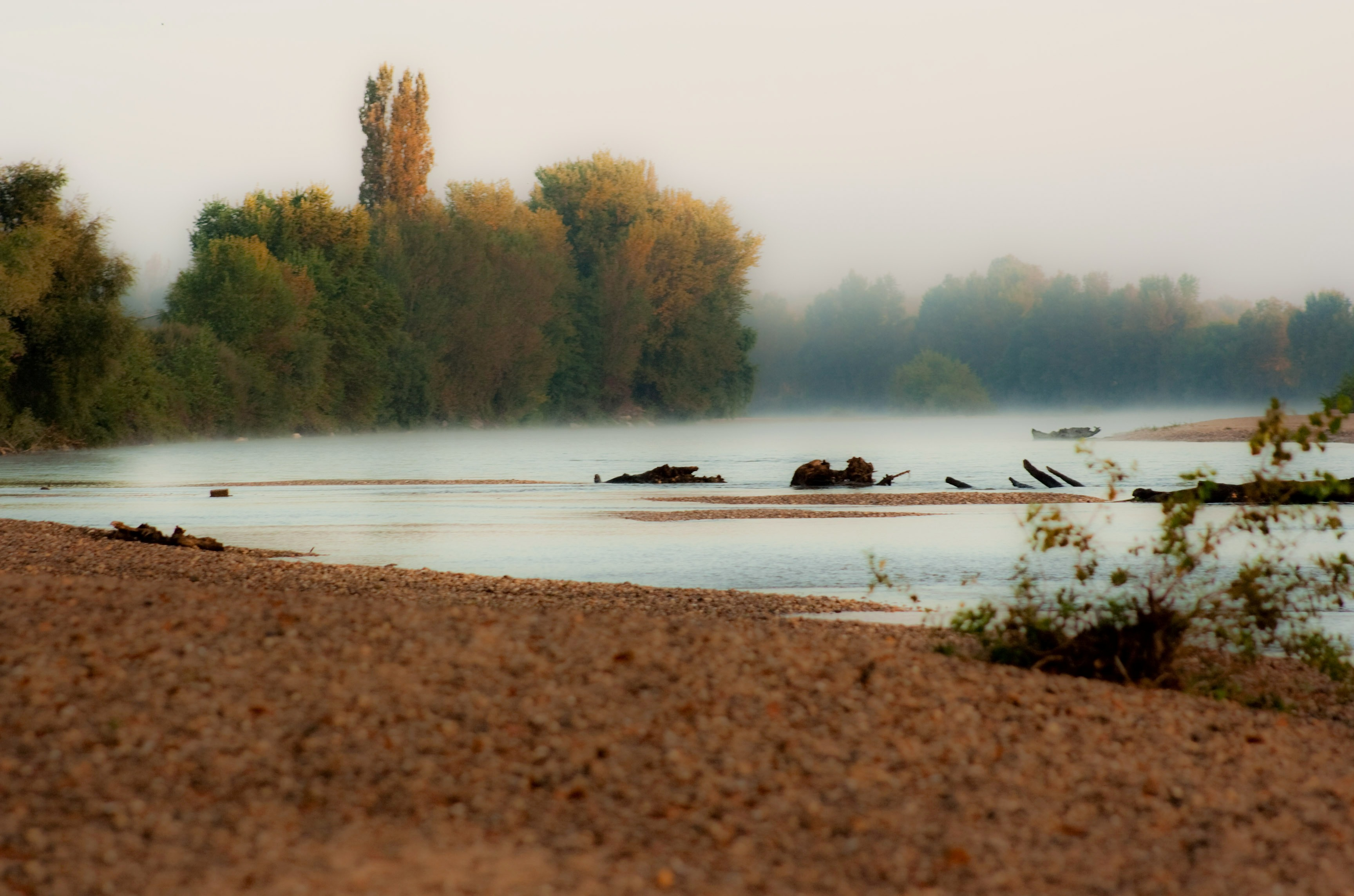 Méandre de l'Allier